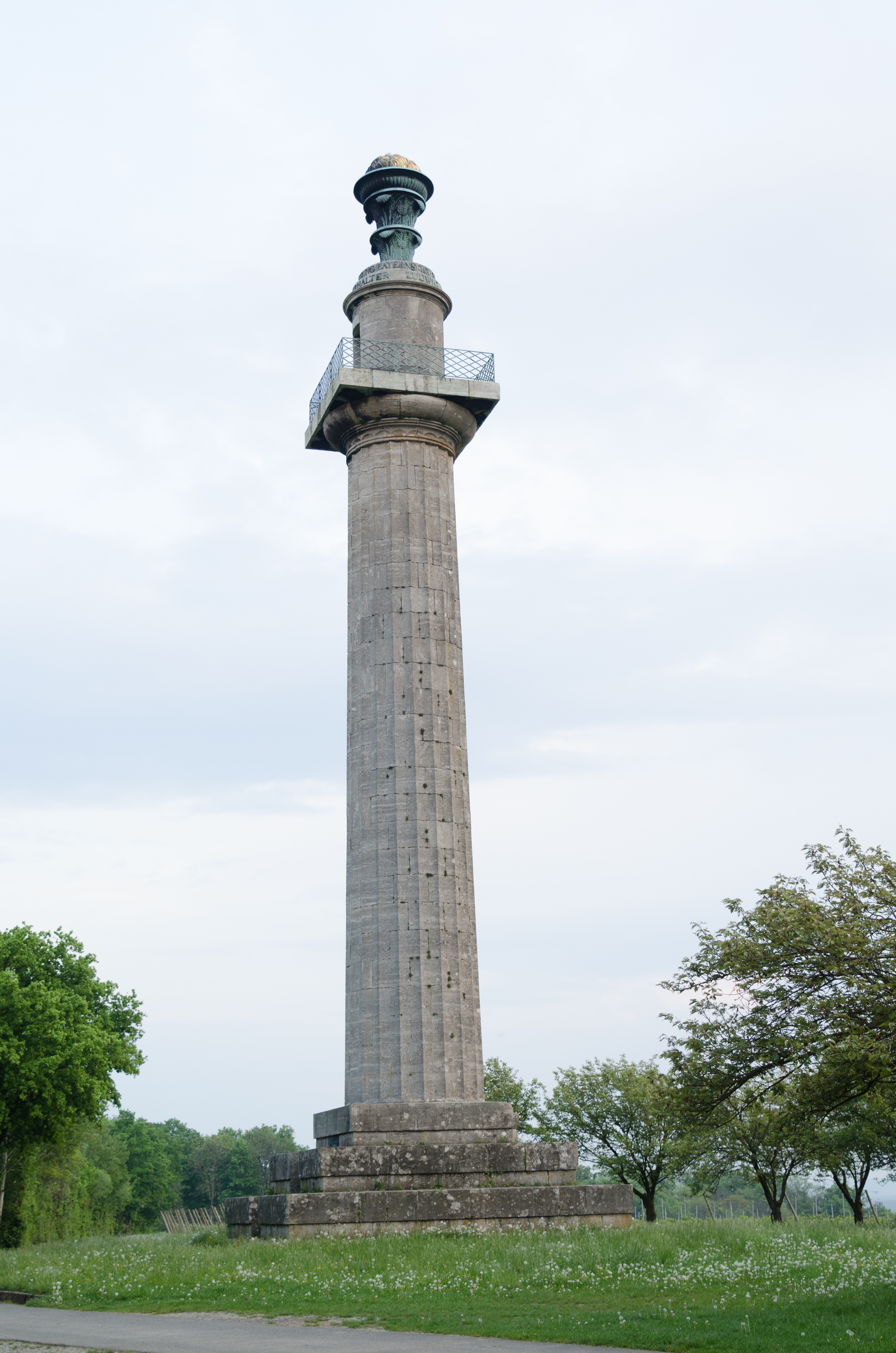 Volkach, Gaibach, Konstitutionssäule